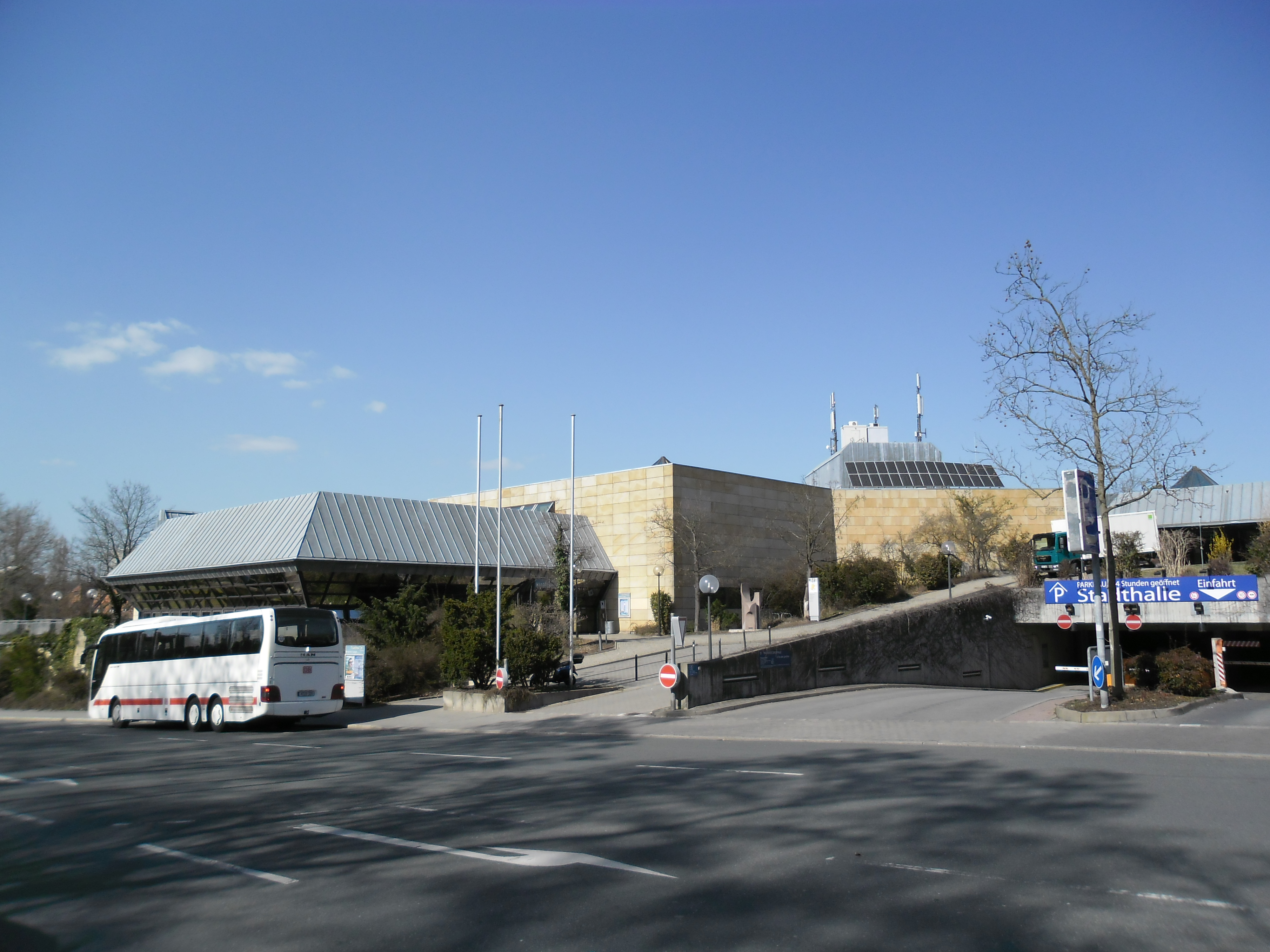 Stadthalle Fürth